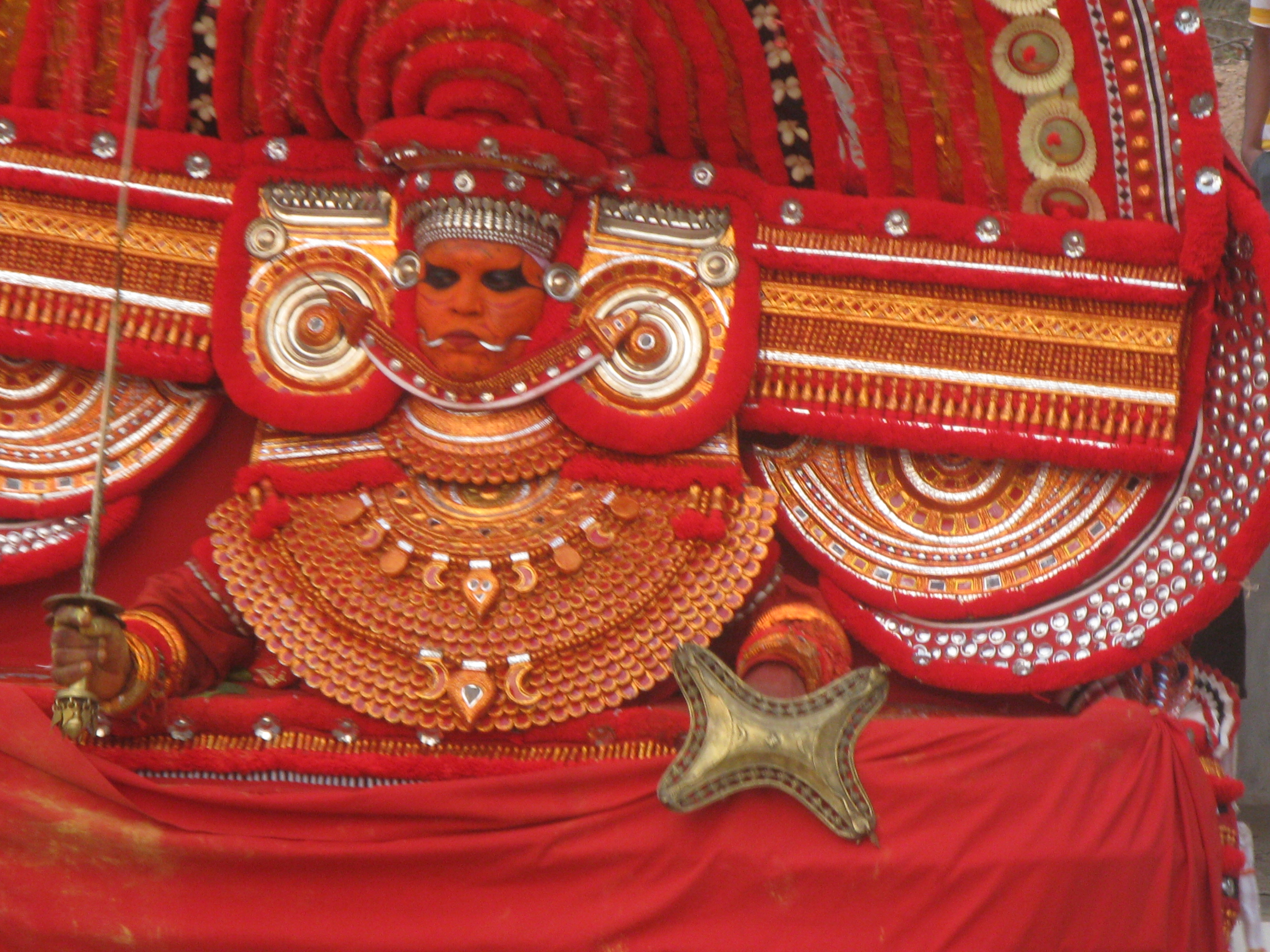 കണ്ണൂർ ജില്ലയിലെ മയ്യിൽ ചെറുപഴശ്ശി കണ്ടനാർ പൊയിൽ മുച്ചിലോട്ടു ഭഗവതി ക്ഷേത്രത്തിൽ 2009 ജനുവരി 25-ന്‌ ട്ടിയാടിയ മുച്ചിലോട്ടു ഭഗവതി തെയ്യം.